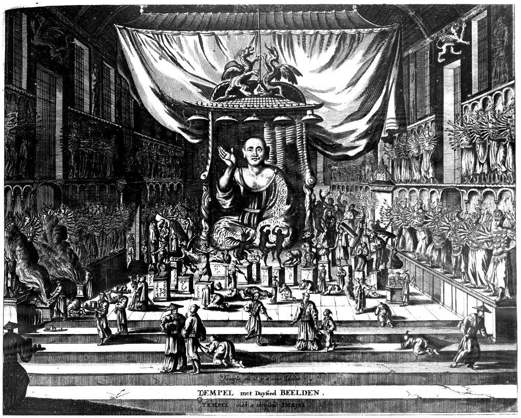 "Gedenkwaerdige gesantschappen der Oost-Indische maetschappy in 't Vereenigde Nederland, aen de kaisaren van Japan: vervaetende wonderlijke voorvallen op de togt der Nederlandsche gesanten: beschryving van de dorpen, sterkten, steden, landschappen, tempels, gods-diensten, dragten, gebouwen, dieren, gewasschen, bergen, fonteinen, vereeuwde en nieuwe oorlogs-daeden der Japanders: verçiert met een groot getal afbeeldsels in Japan geteikent: getrokken uit de geschriften en reis-aenteikeningen der zelve gesanten / door Arnoldus Montanus". Amsterdam: By Jacob Meurs, 1669